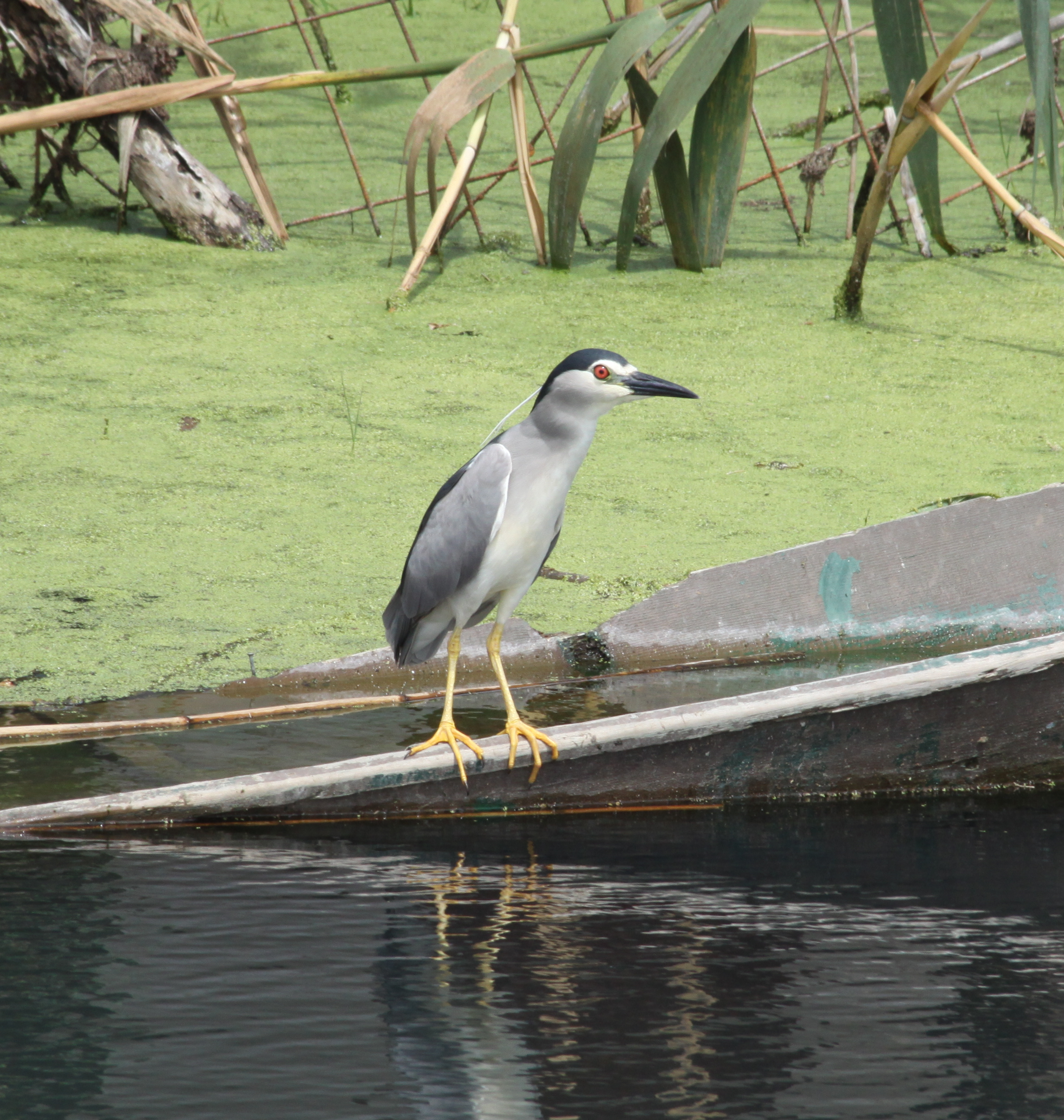 Νυχτοκόρακας στον Ποταμό Λούρο This is a photography of Natura 2000 protected area with ID GR2110001